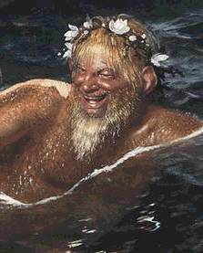 detail